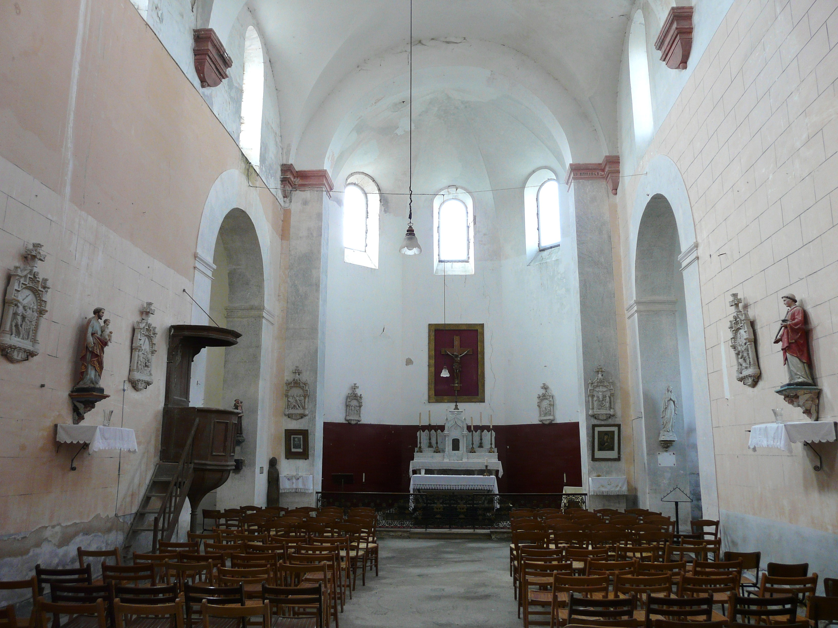 La nef de l'église Saint-Étienne, Firbeix, Dordogne, France.